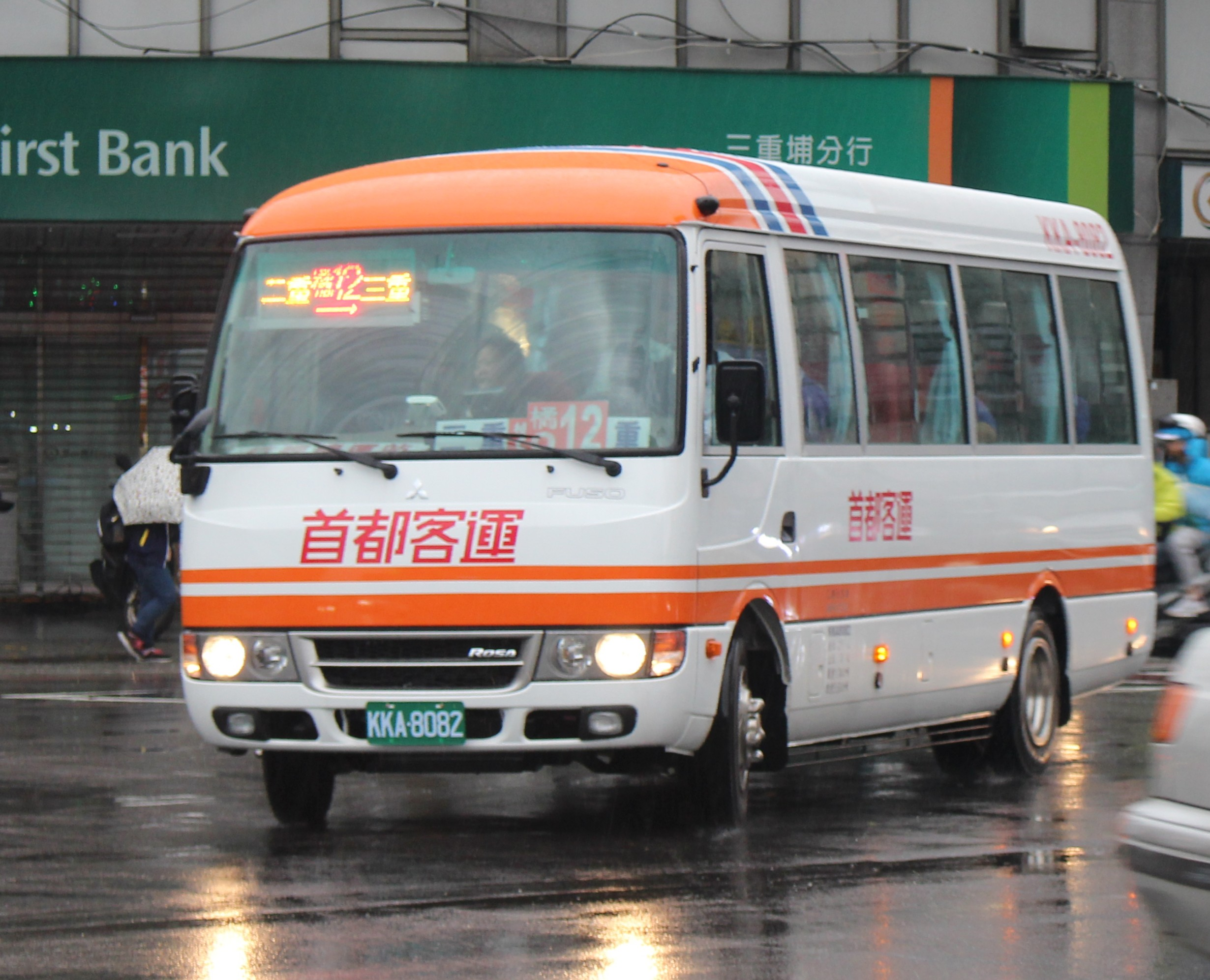 中文（台灣）: 首都客運2018年ROSA BE641G中型巴士KKA-8082，行駛新北市區公車橘12線，雨中行經第一銀行三重埔分行前。